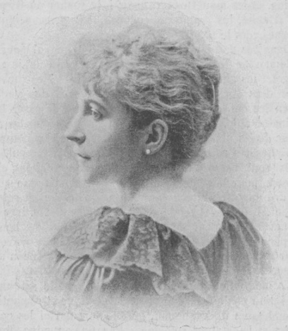 "Mme Paulmier. - (photographie Otto.)"Valentine Bouillant, épouse de Charles-Ernest Paulmier (mort en 1907) puis (en 1908) du marquis Albert de Dion.